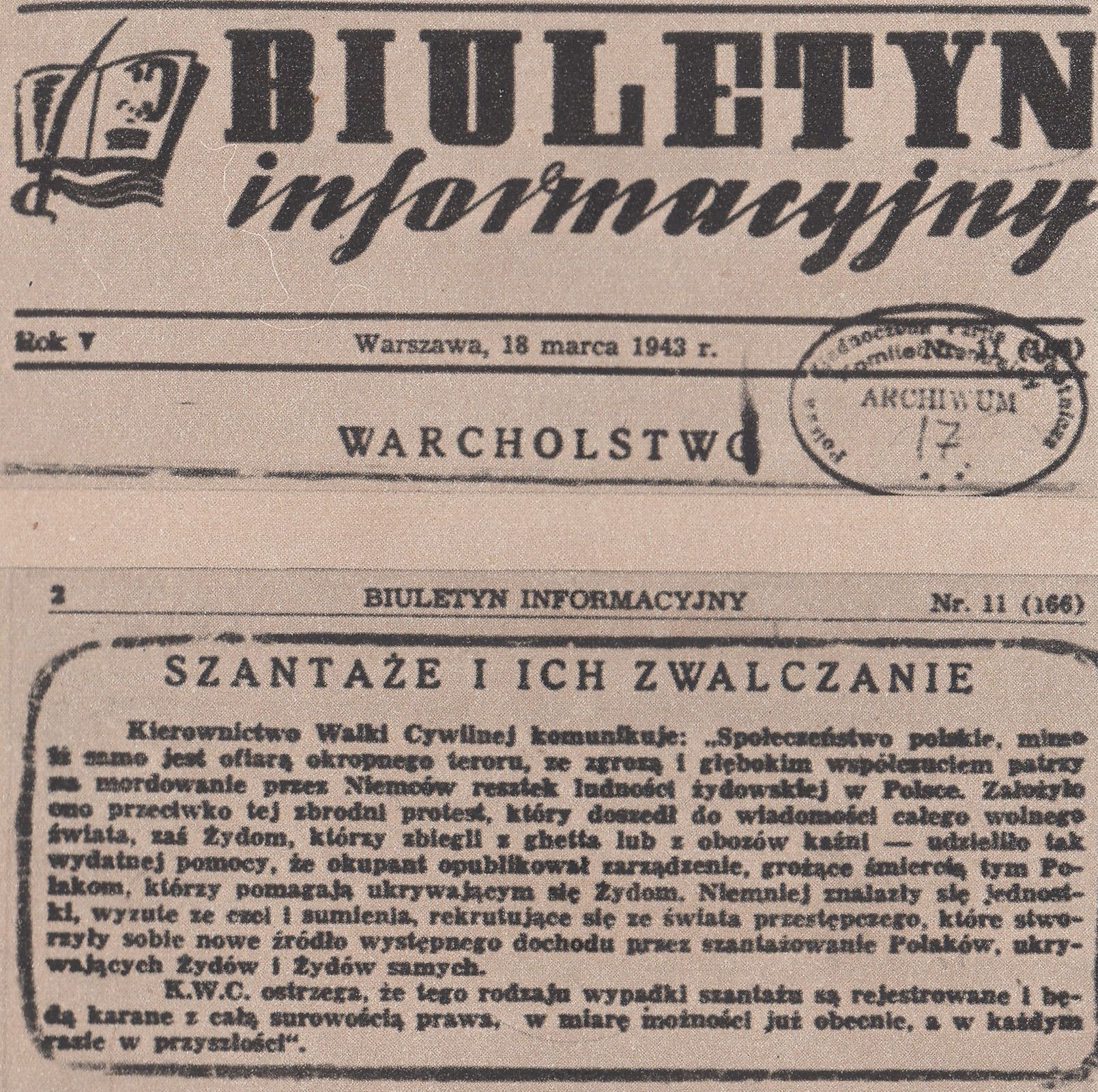 Biuletyn Informacyjny 18 marca 1943